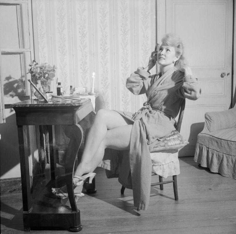 Noelle Norman dans son boudoir, 2 septembre 1944.